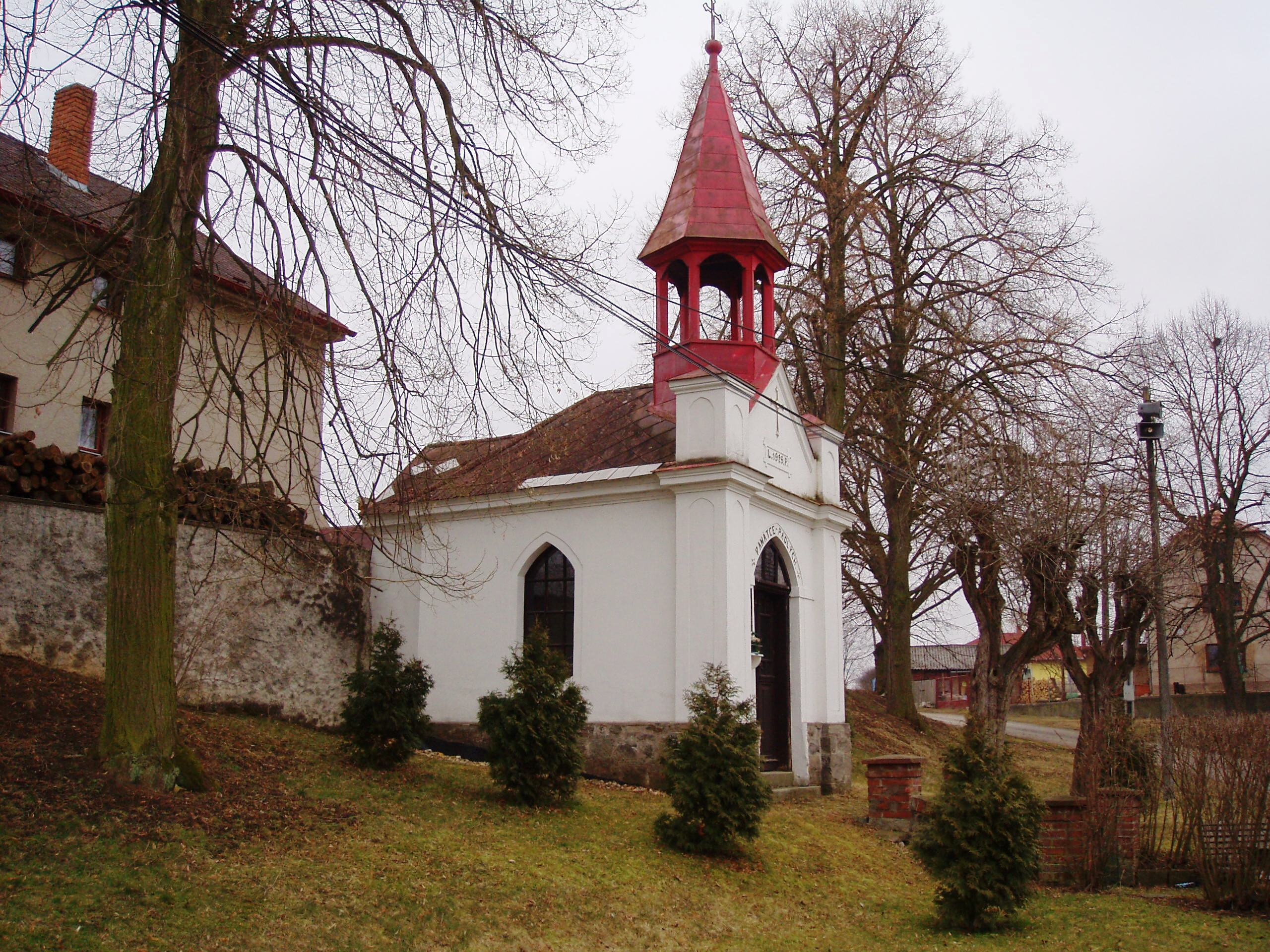 Ouběnice,kaple z roku 1929